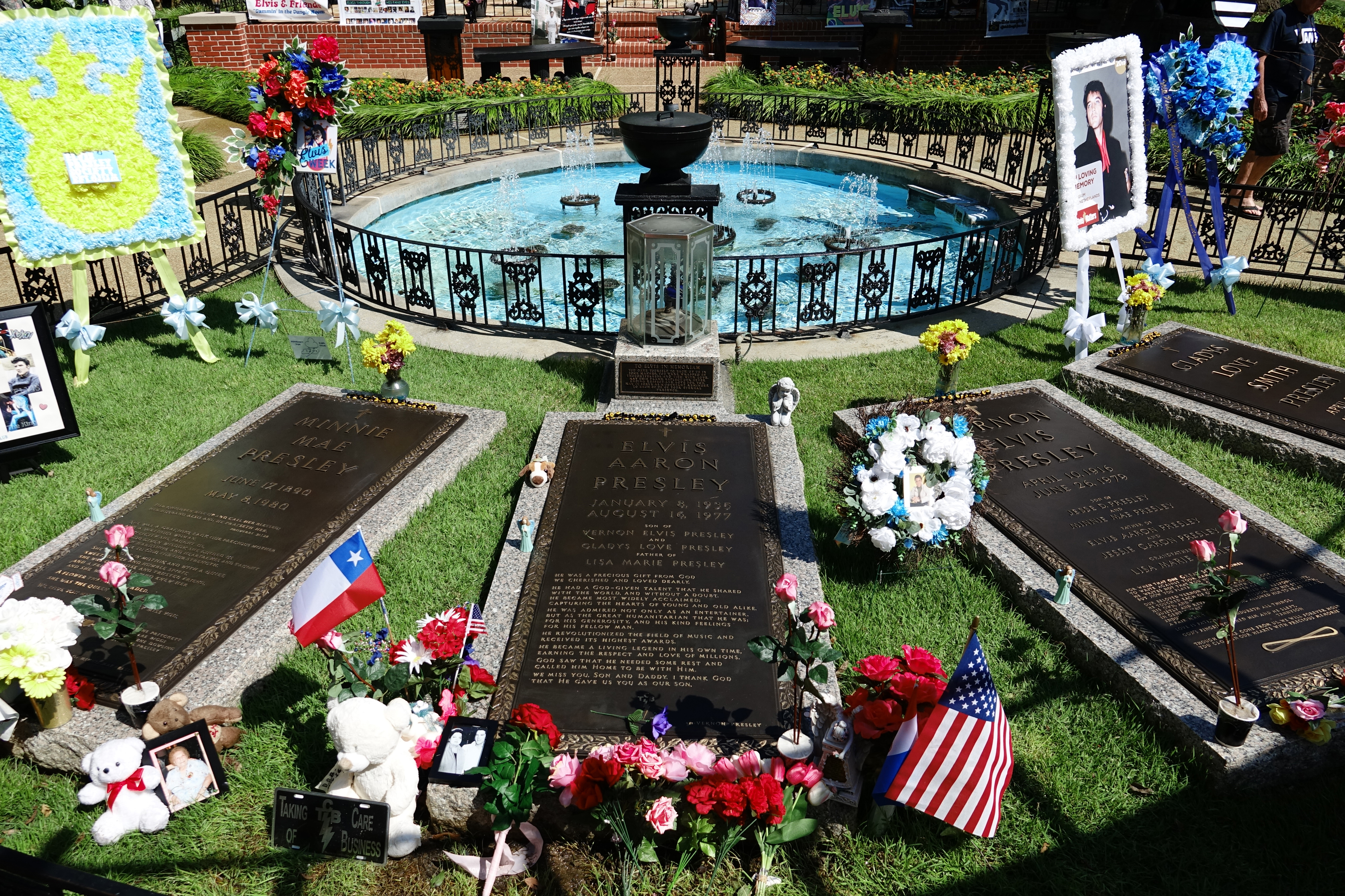 Graceland - Elvis Presley, pierres tombales